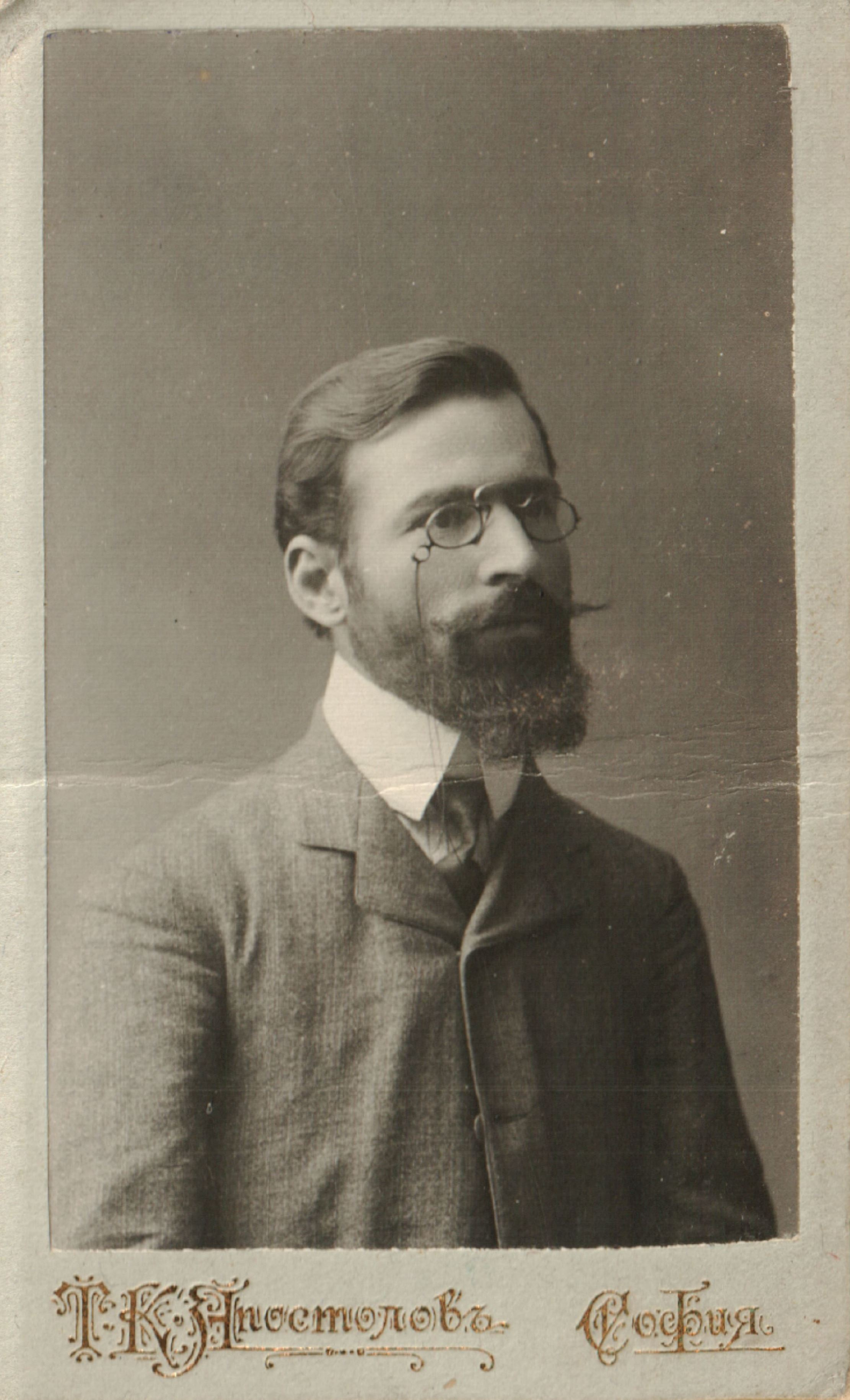 Снимка на Георги Баждаров.